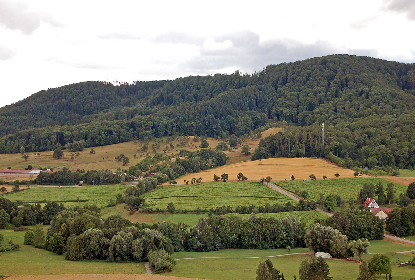 Bromberg-Panorama über dem Kirbachtal: links die Bromberger Höfe, darüber der Geißbühl und der Sporn des Burgstalls, rechts die Bromberger Mühle (Blick von Norden, von den Weinbergen über Spielberg)